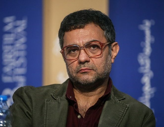 علیرضا ثانی‌فر - بهمن ۱۳۹۸